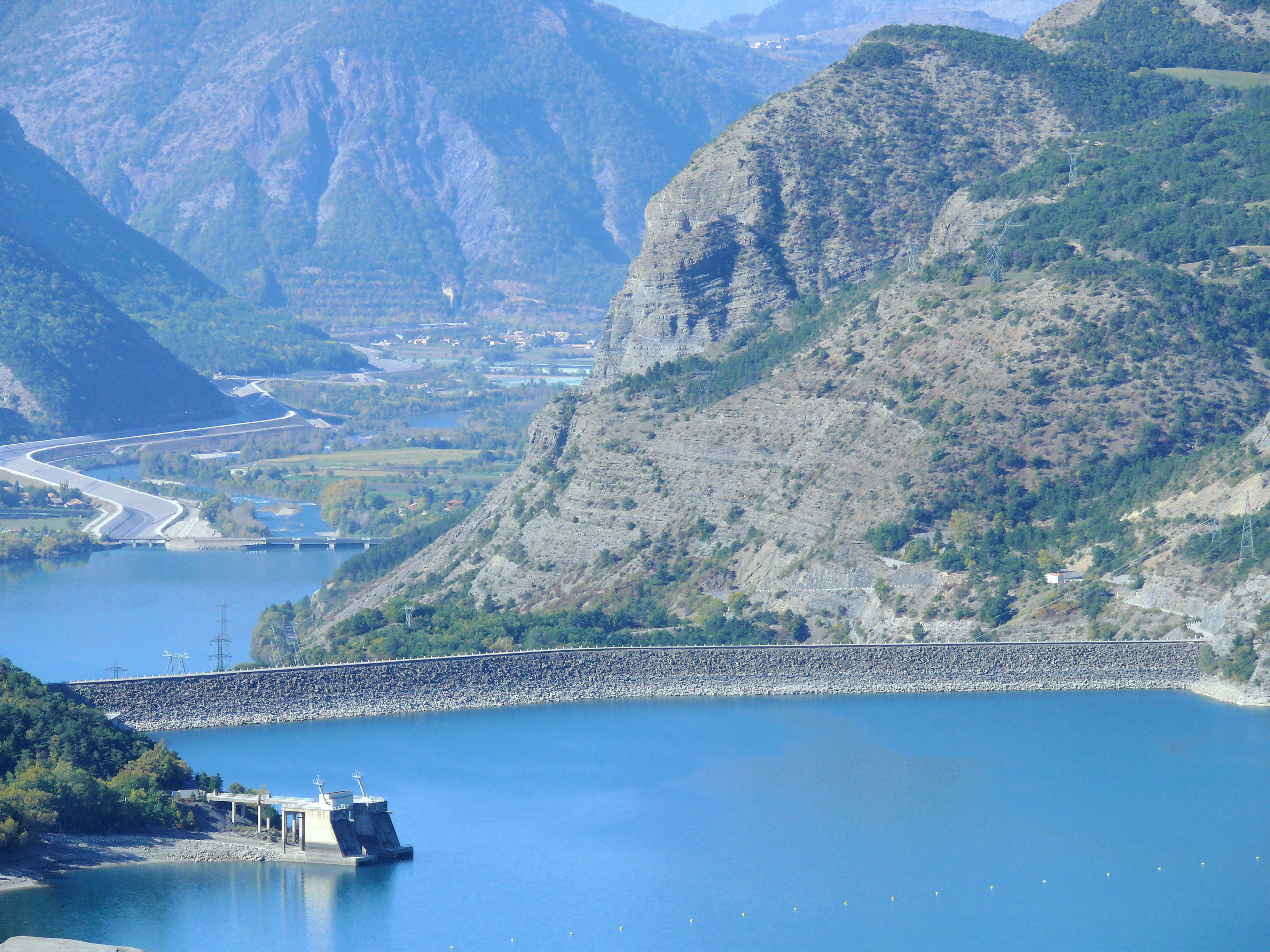 Le brrage de Serre-Ponçon vu du belvédère de Sauze-du-Lac